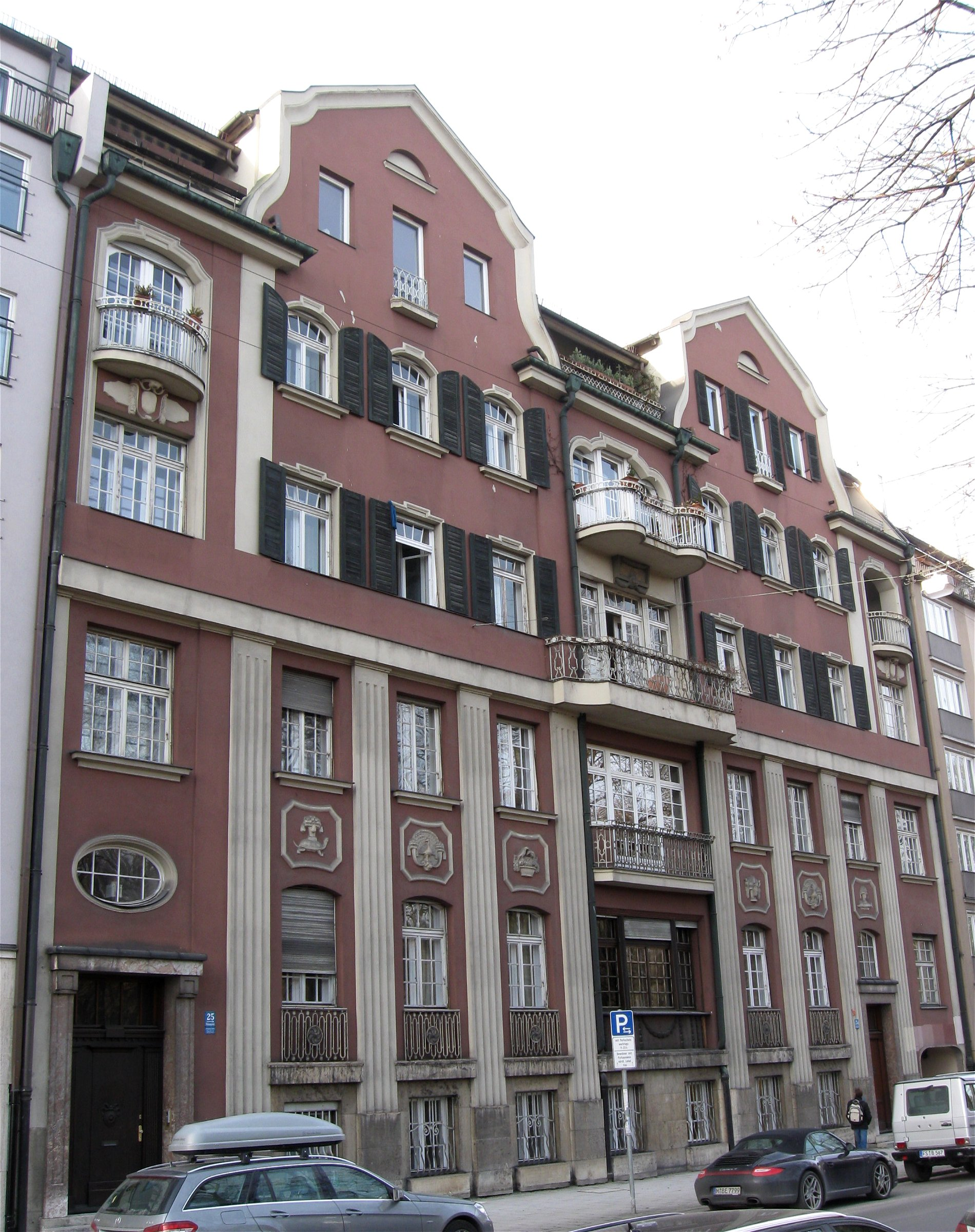 Widenmayerstraße 25/25a; Doppelhaus, klassizistischer Jugendstil, bez. 1911, von Emanuel von Seidl